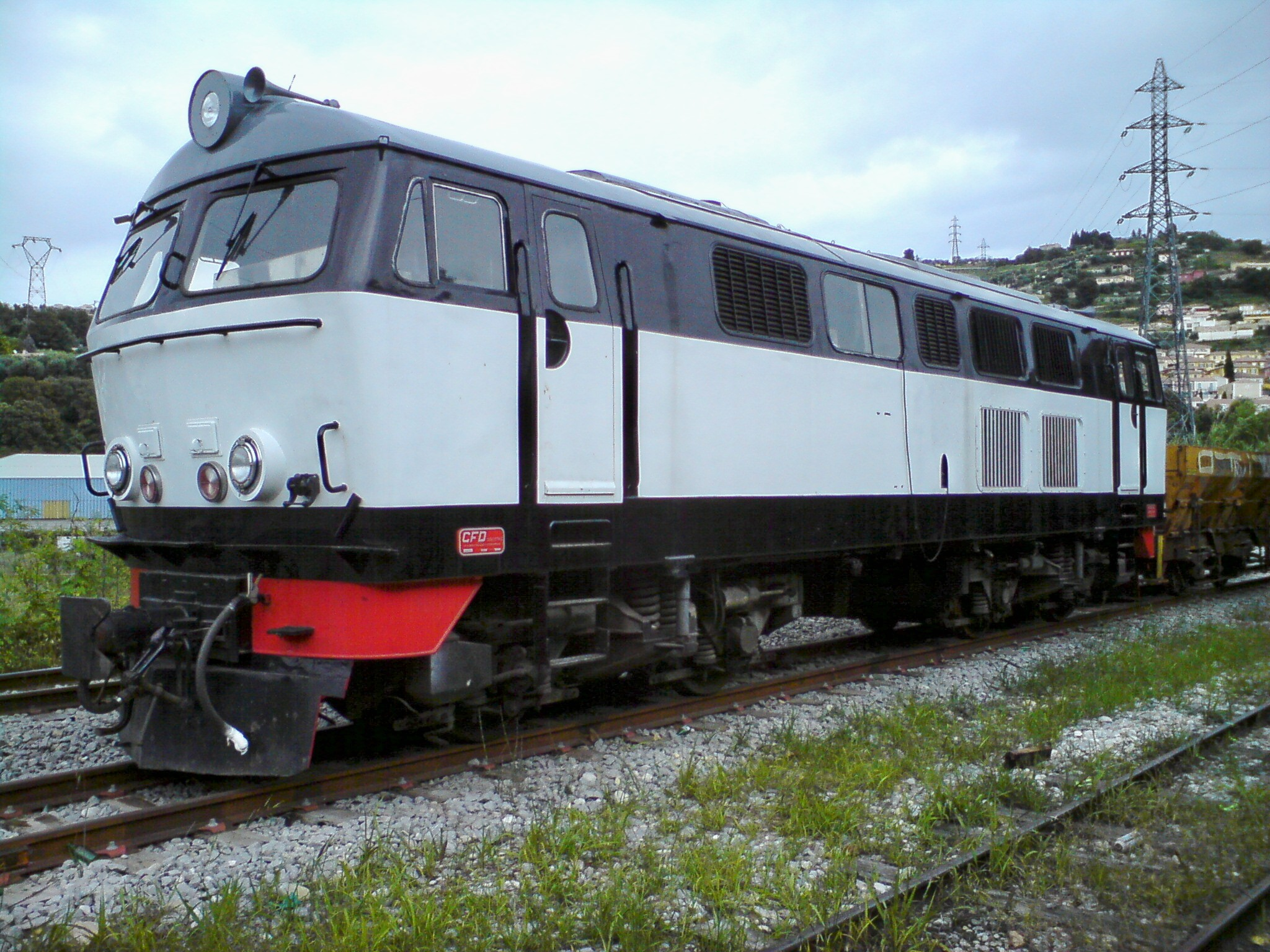 Locomotive diesel pour voie métrique Henschel N°31003 (année 1966) des Chemins de fer de Provence, photographiée aux ateliers de Nice-Lingostière